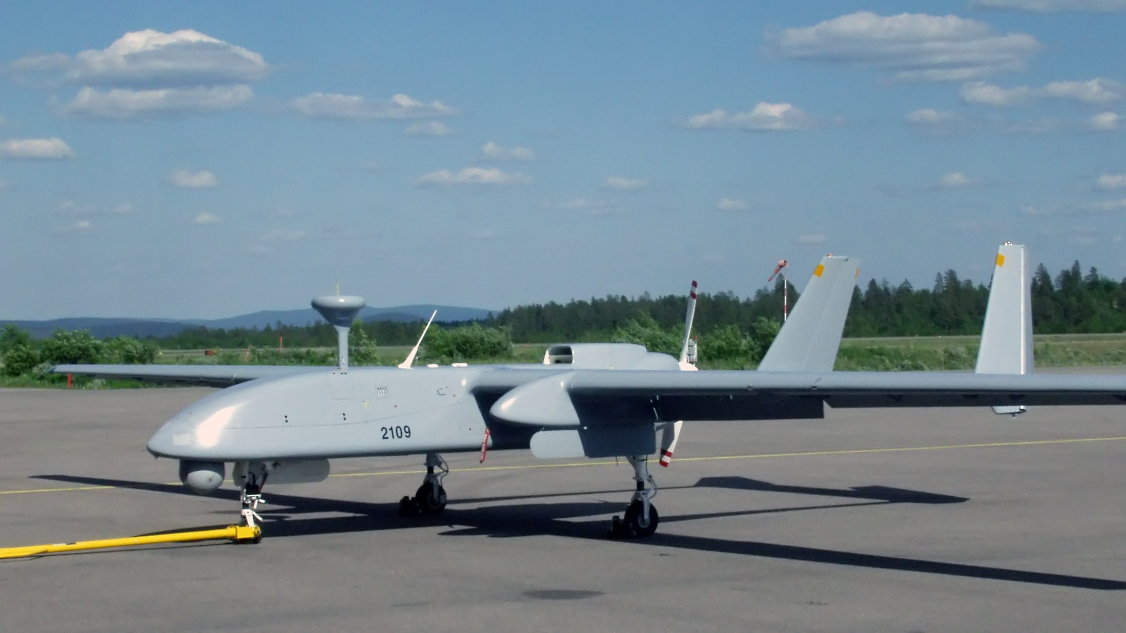 Unbemannte Luftfahrzeuge könnten zukünftig die Küstenwache und den Katastrophenschutz aus der Luft unterstützen. Das DLR berücksichtigte in einer ersten Simulationskampagne ein Fluggerät vom Typ Heron-1, das im Sommer bei realen Flugversuchen der spanischen Firma Indra SA zum Einsatz kommen soll.